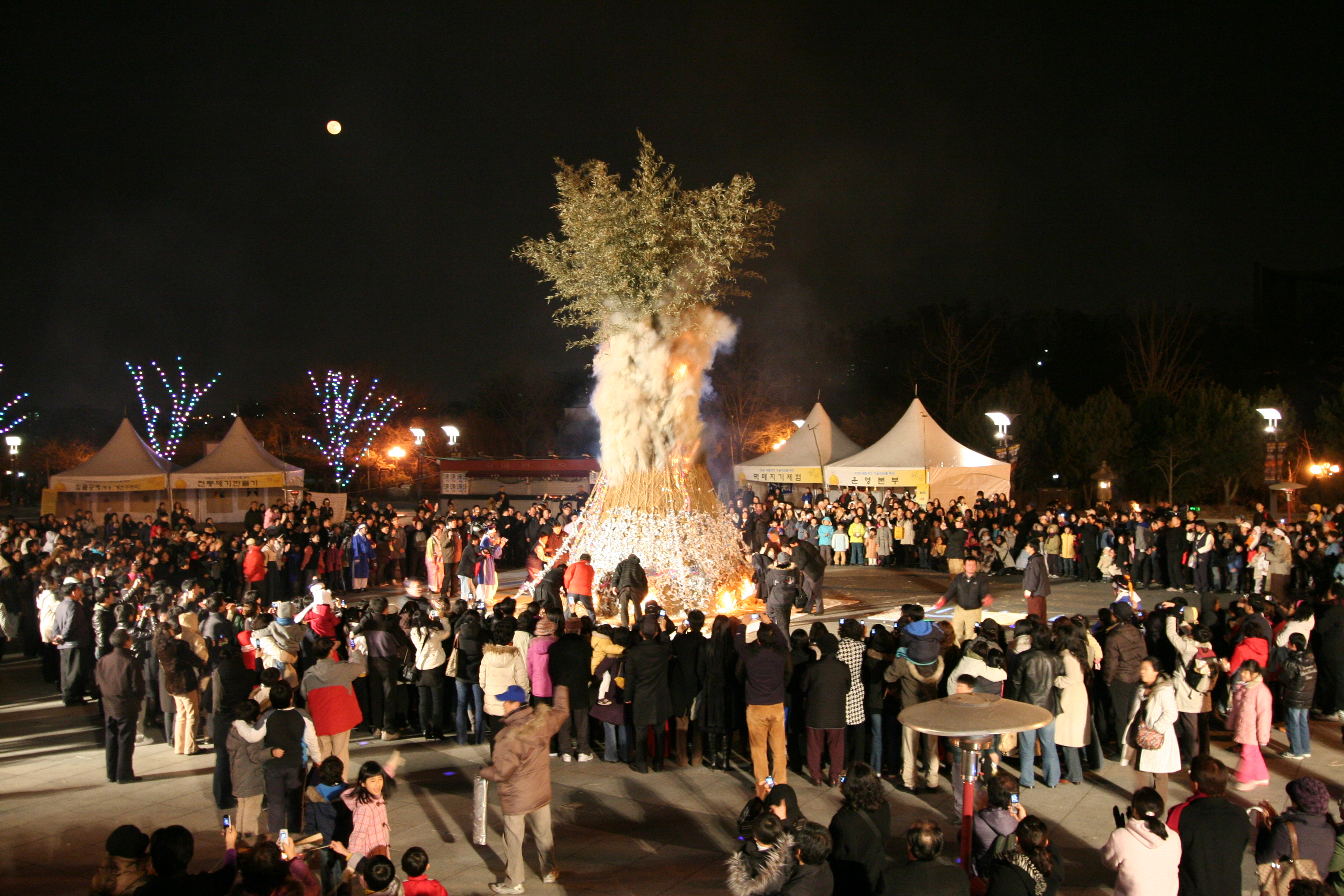 Korea-Daeboreumnal-Full Moon Festival